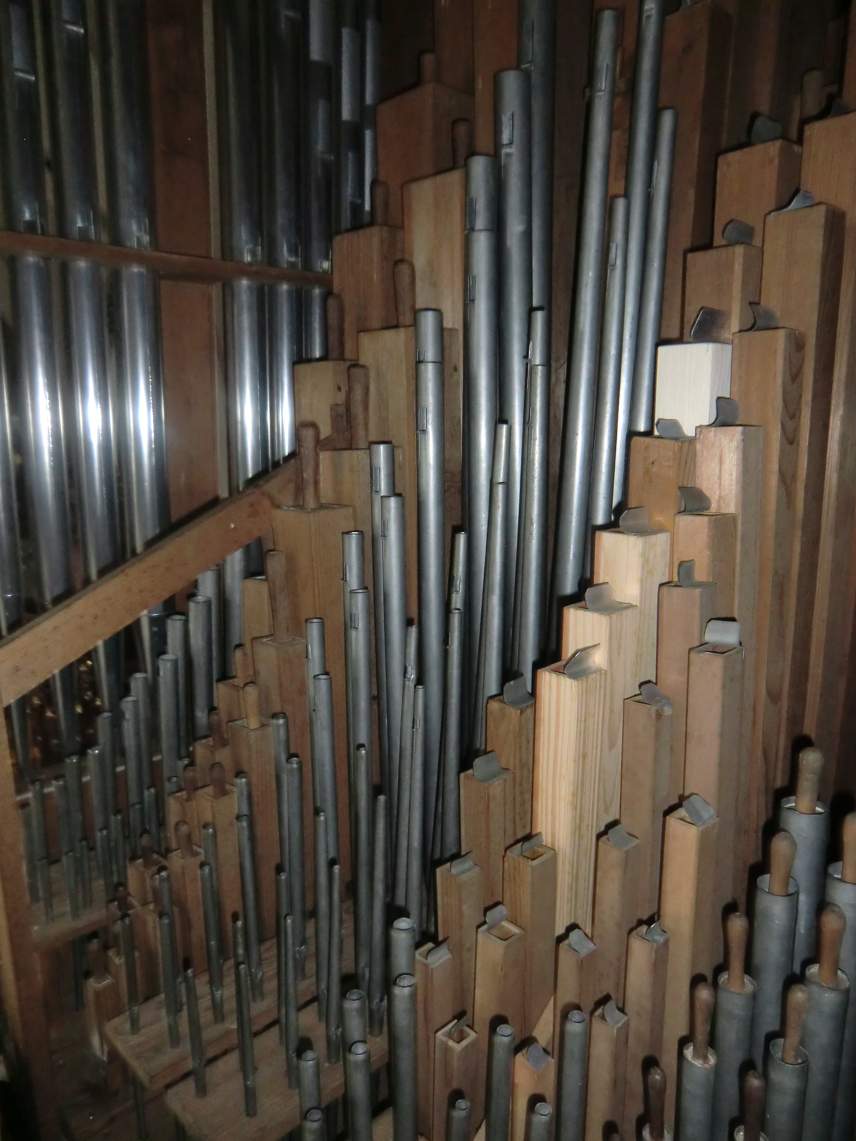 Keller-Orgel Kransberg (1876) - Blick ins Pfeifenwerk von Haupt- und Nebenmanual (vorderer Bereich)